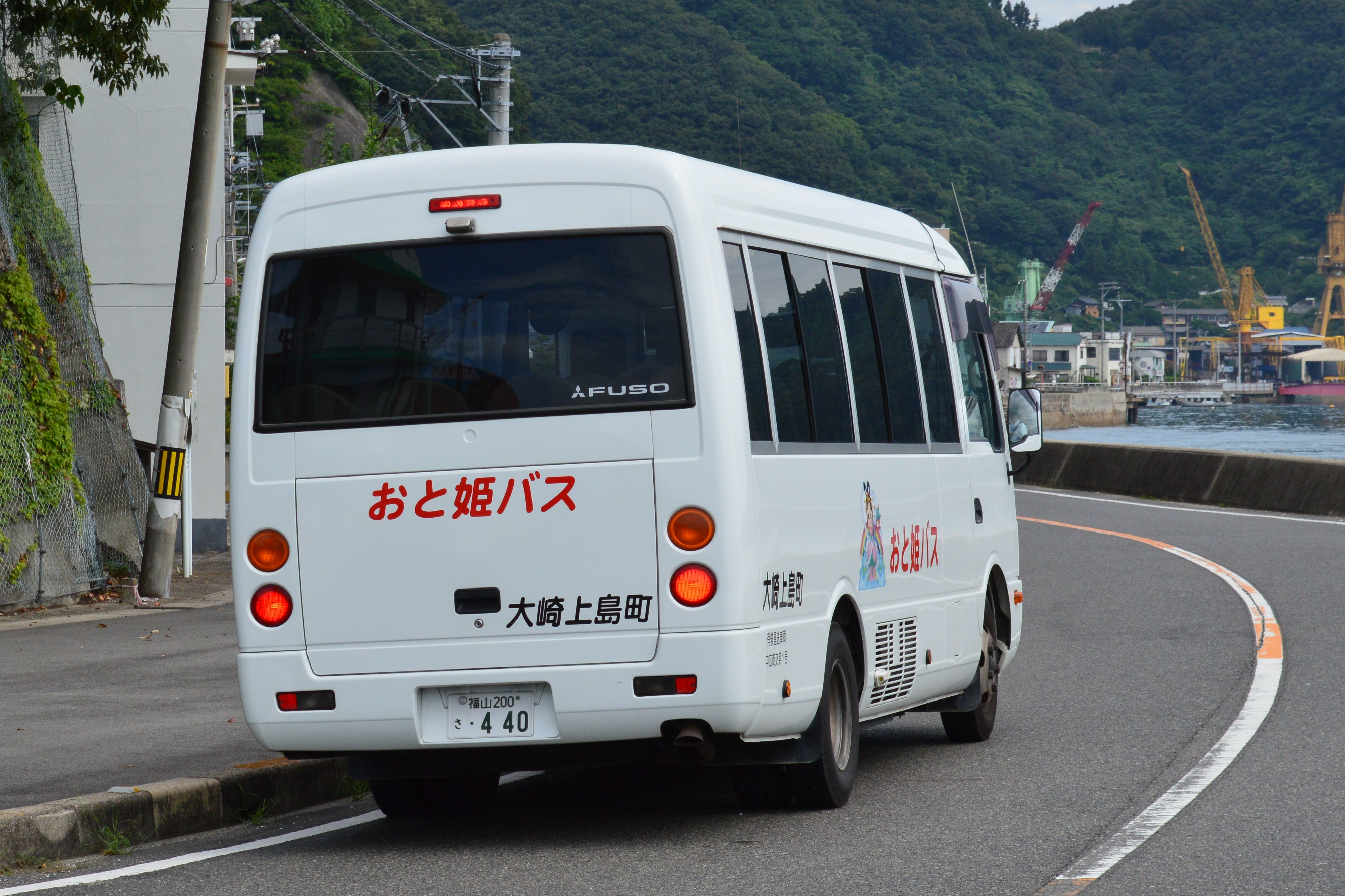 広島県の大崎上島を走る町営おと姫バス